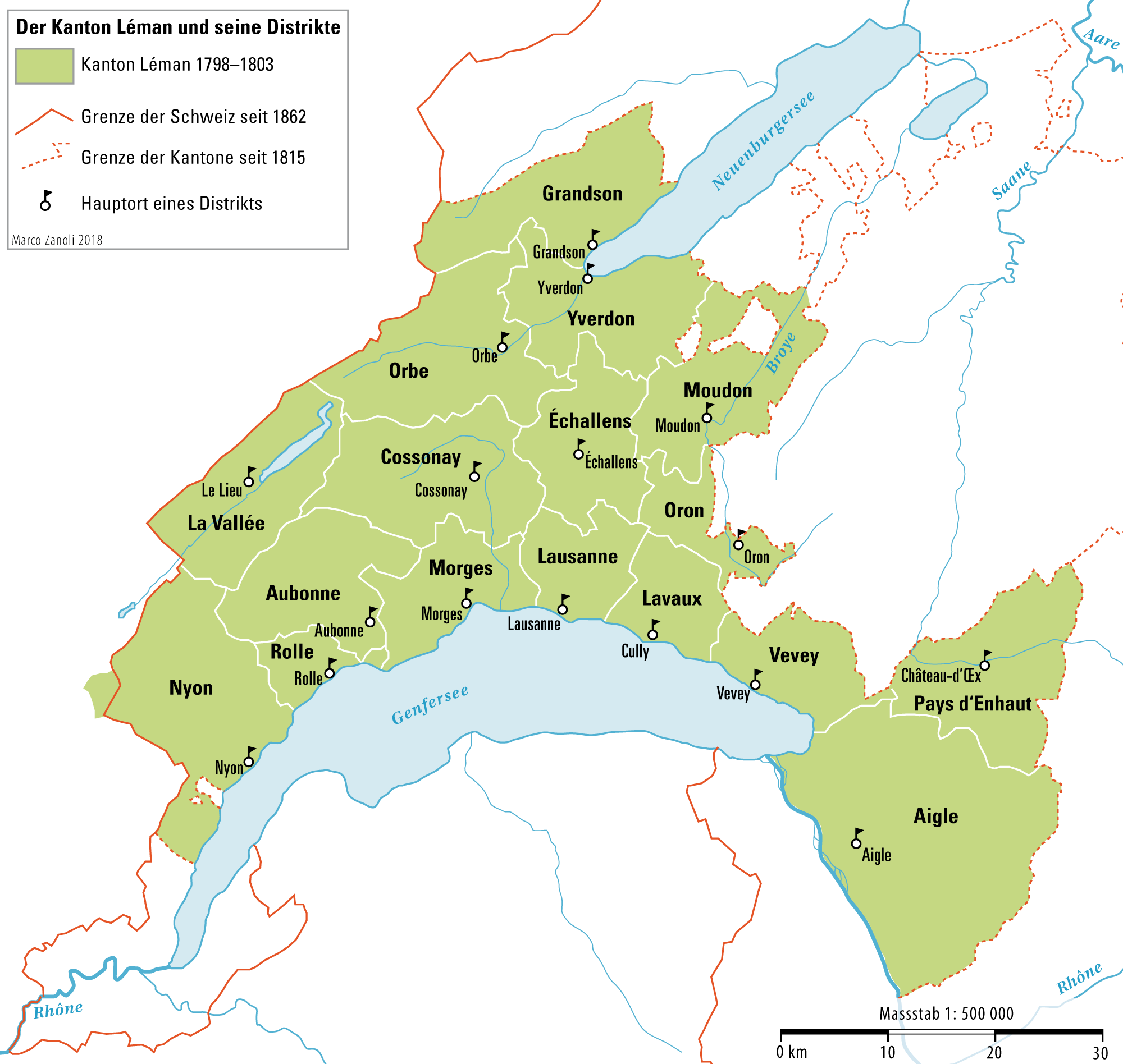 Der Kanton Léman und seine Distrikte 1798-1803